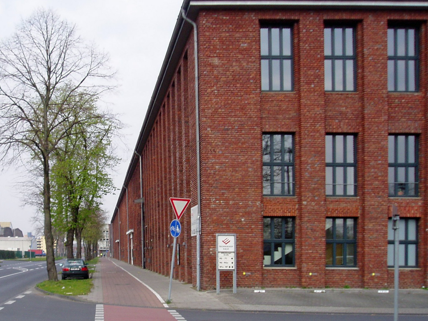 Köln-Kalk - Technologiehof